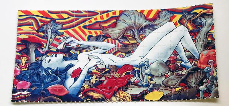 Блоттер 98x1,2mg психоактивного вещества 25B-NBOMe.